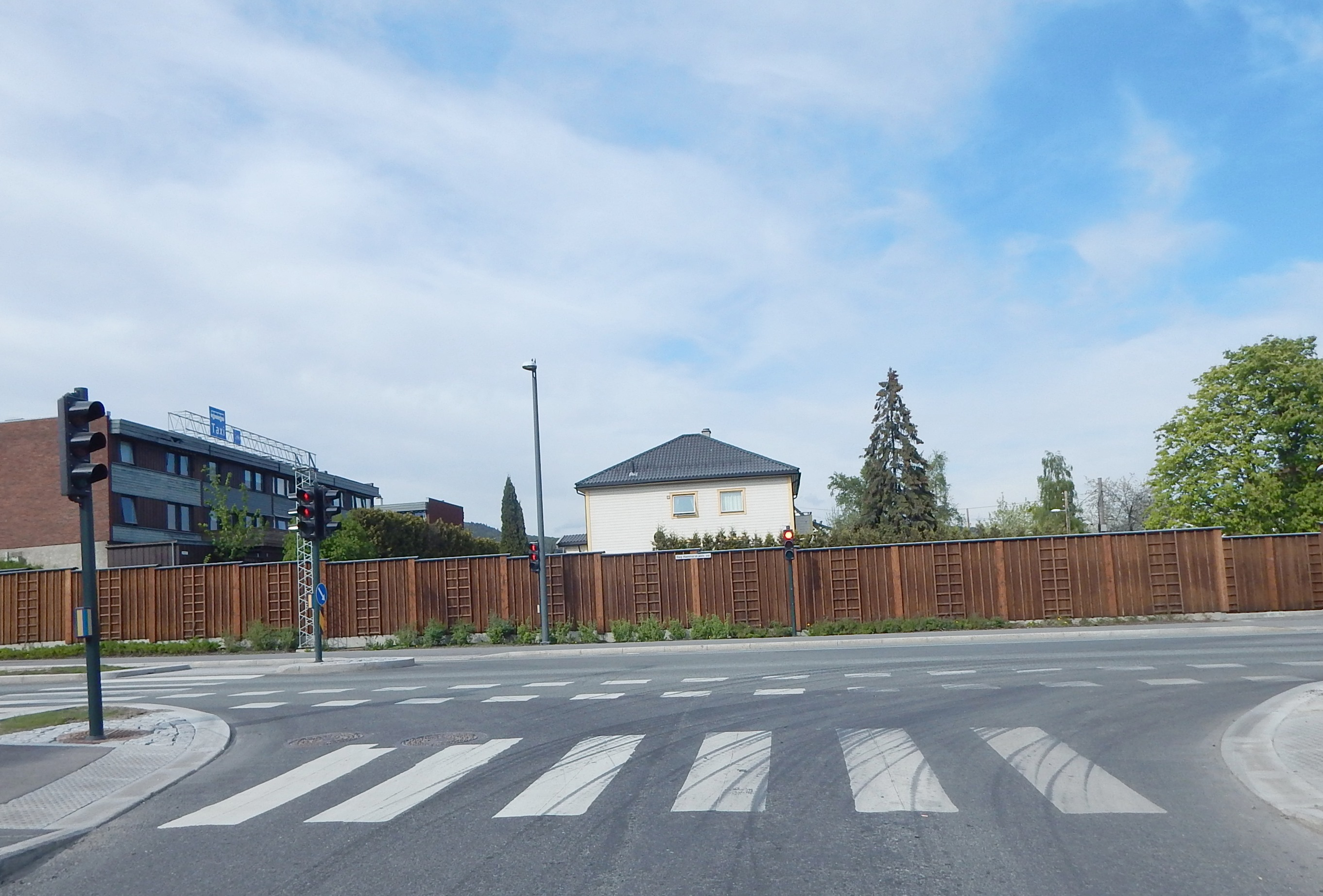 Dag Hammarskjølds vei som lokalvei på Løren, sett fra Peter Møllers vei